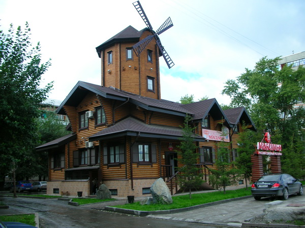 Рестораны «Максимыч» и «Максимка» (г. Тюмень, ул. 50 лет Октября)